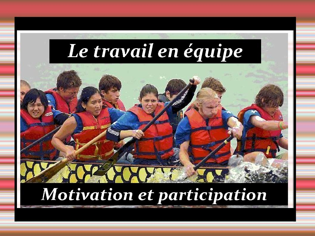 Illustration du travail en équipe empruntée au sport